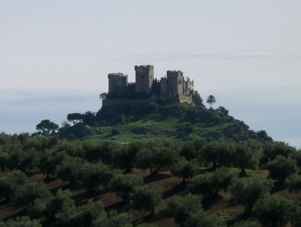 Castillo de Almodóvar del Río, Andalusien, Spanien